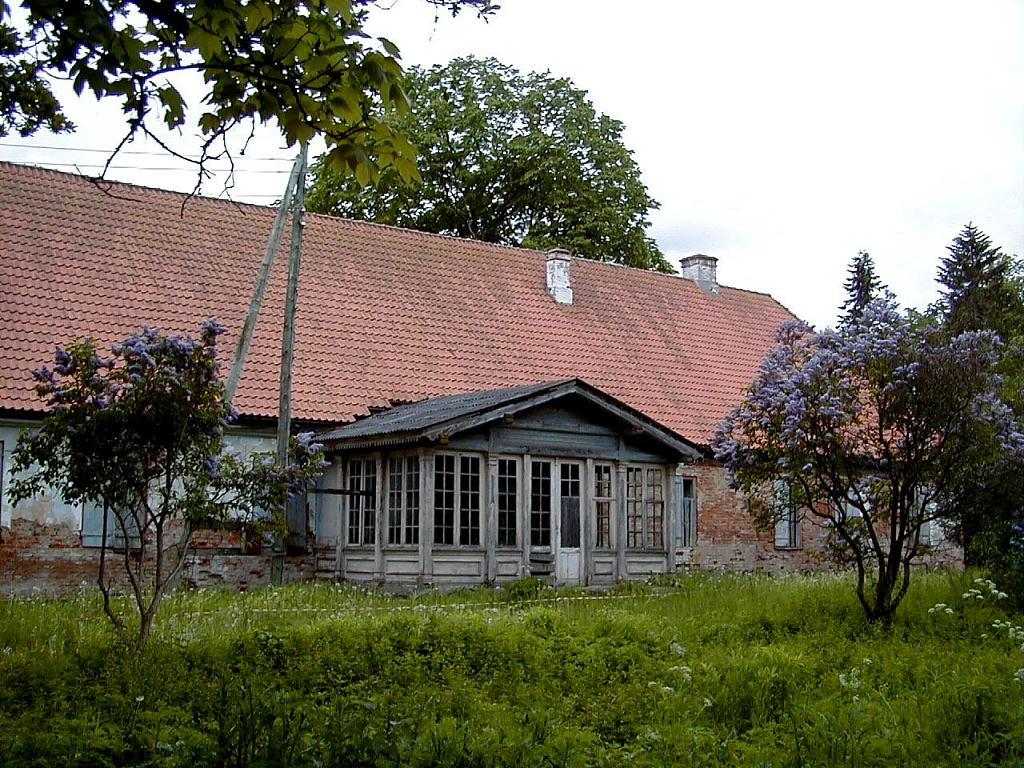 Oktes muiža 2001-06-09